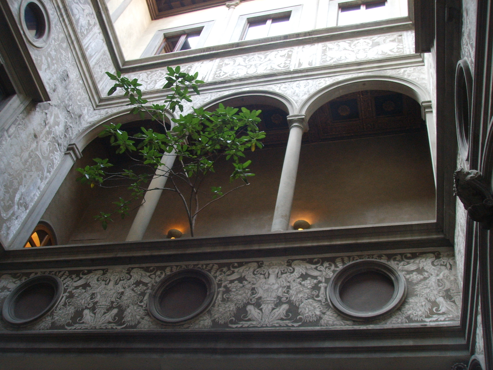 Palazzo Bartolini Salimbeni, cortile